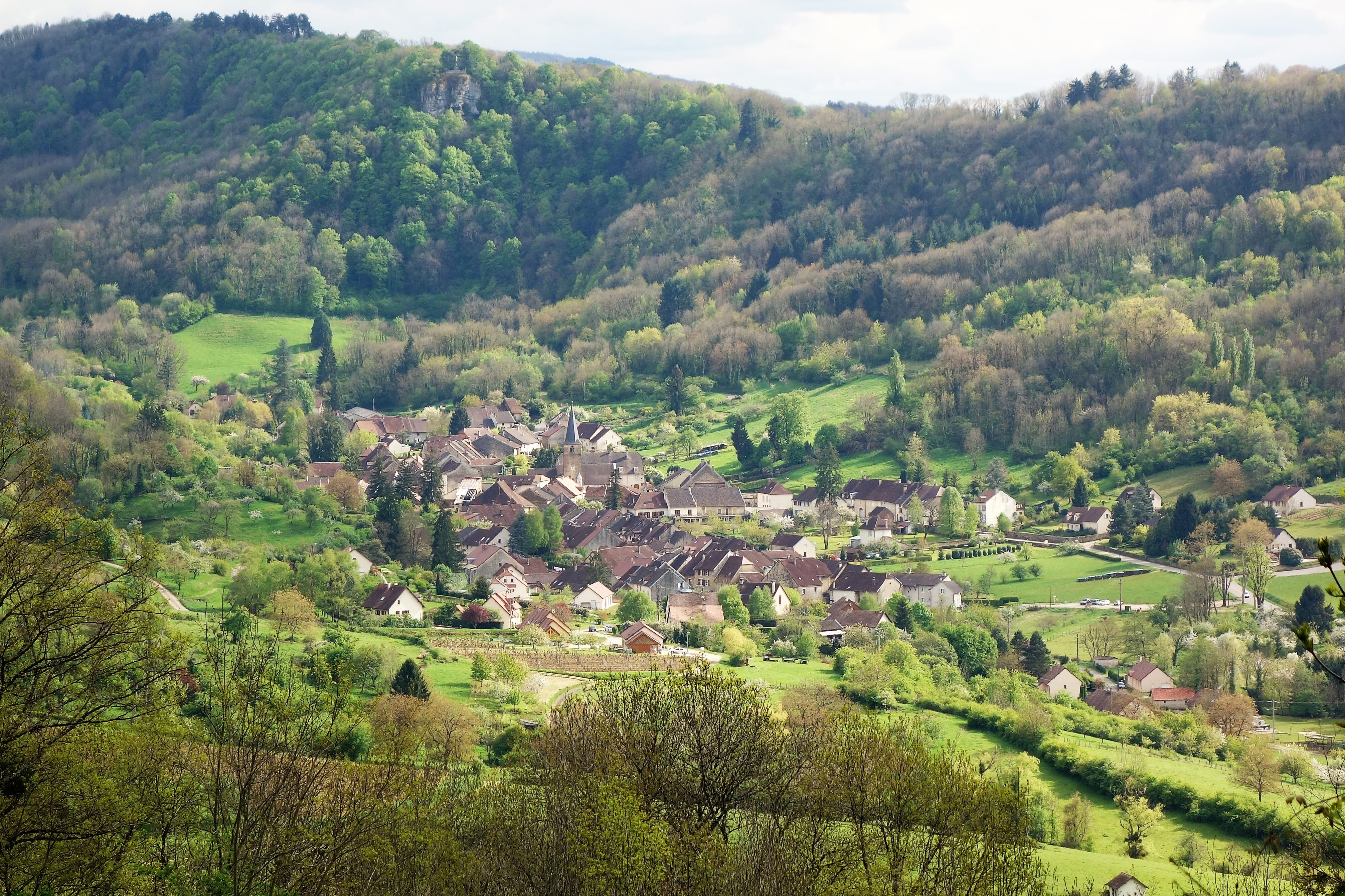 Vue de Vernantois